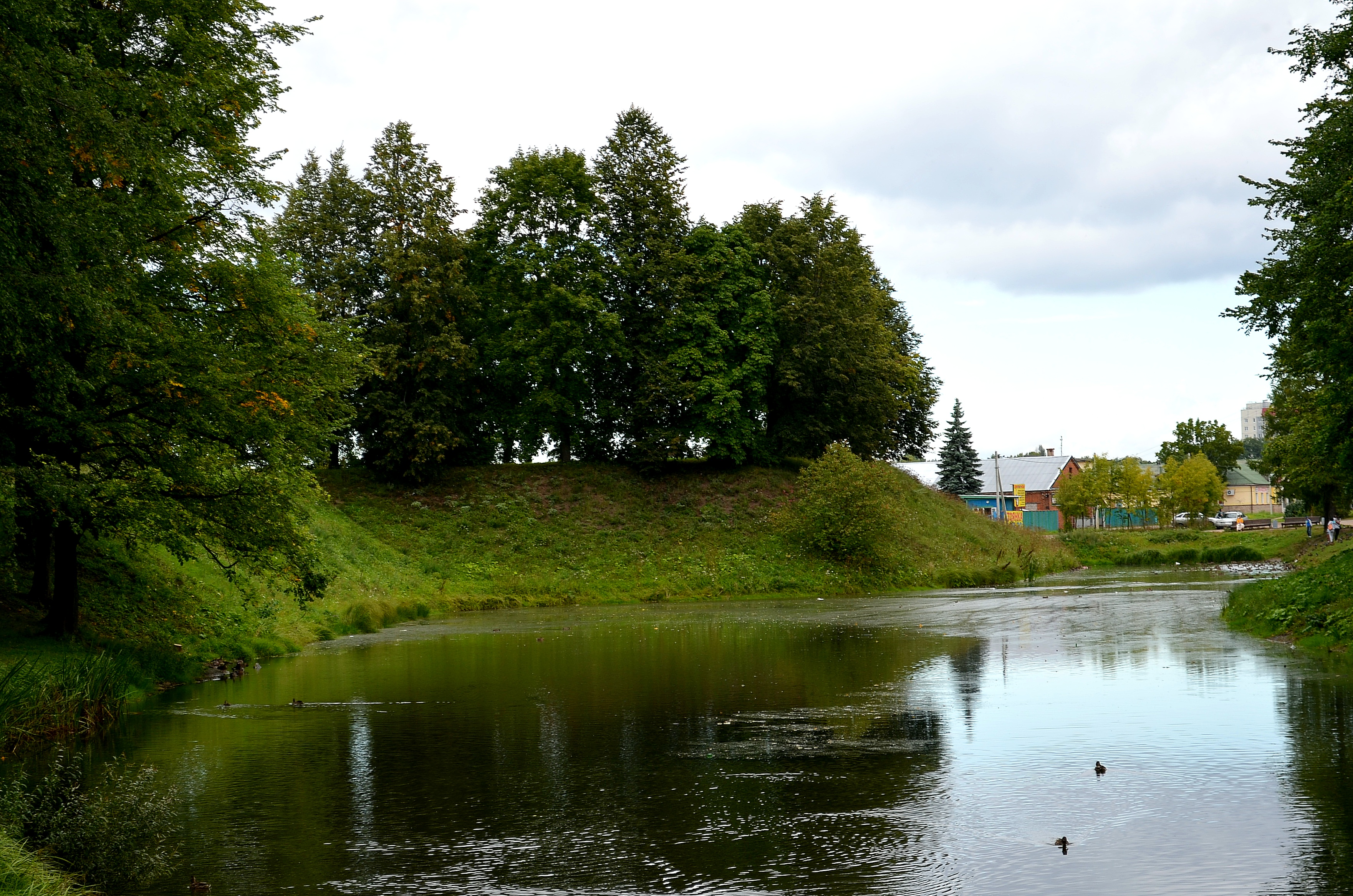 Крепость Ям. Пруд (ров): Кингисепп, Кингисеппский район, Ленинградская область